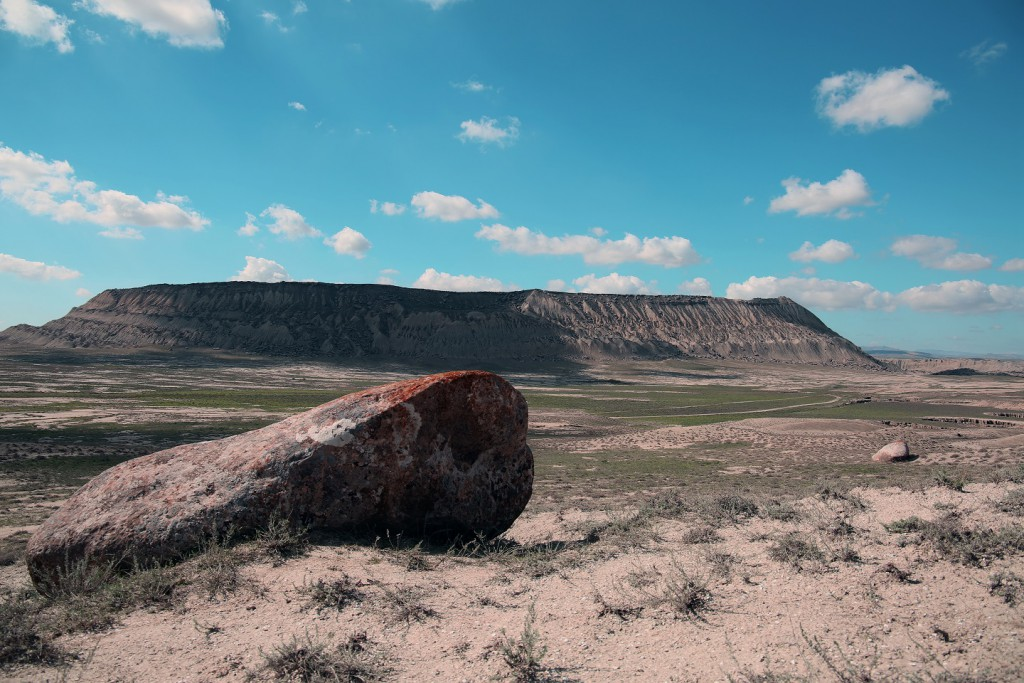 Cingirdağ